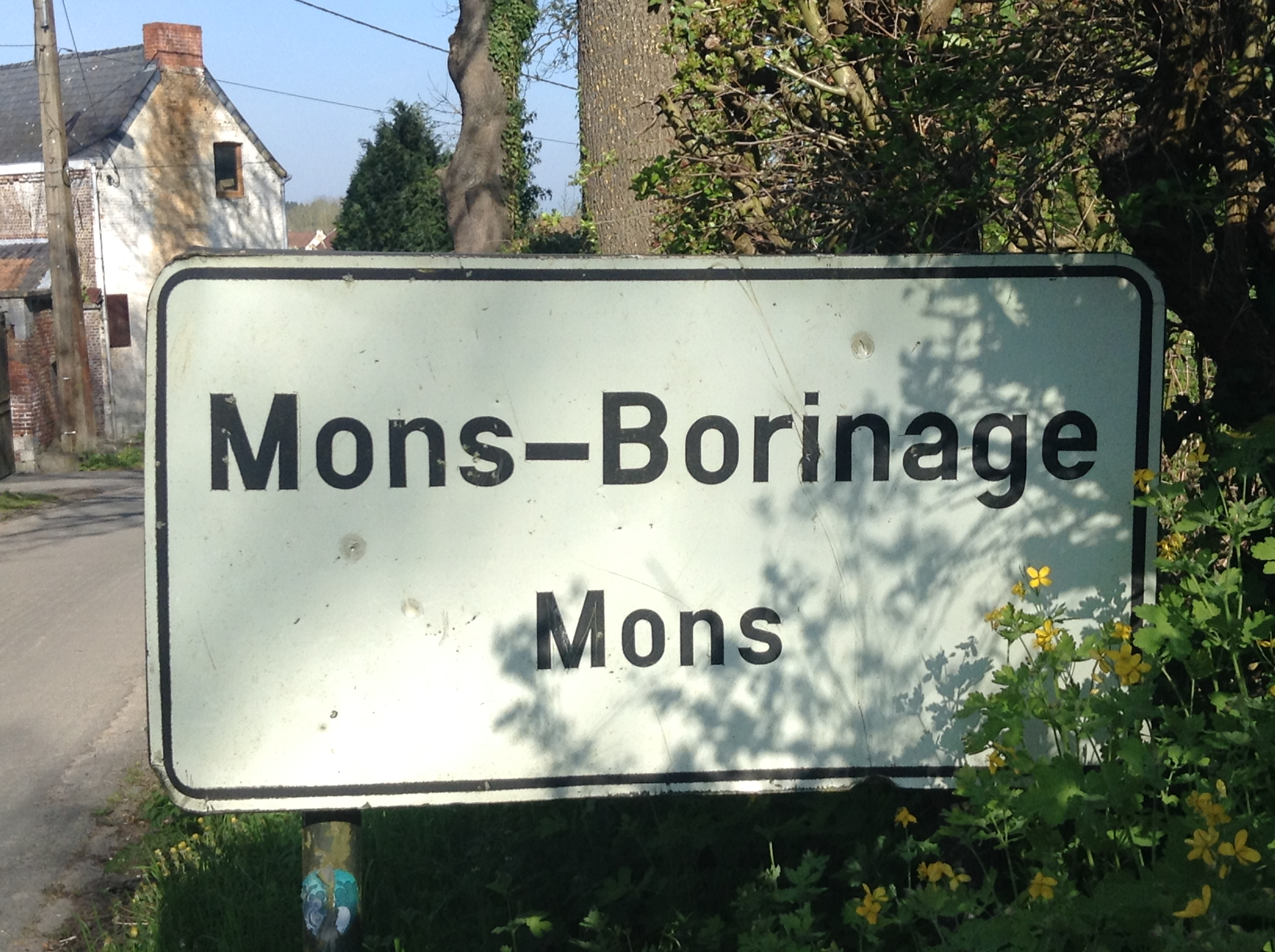 Signalisation à l'entrée d'Hyon, Belgique.